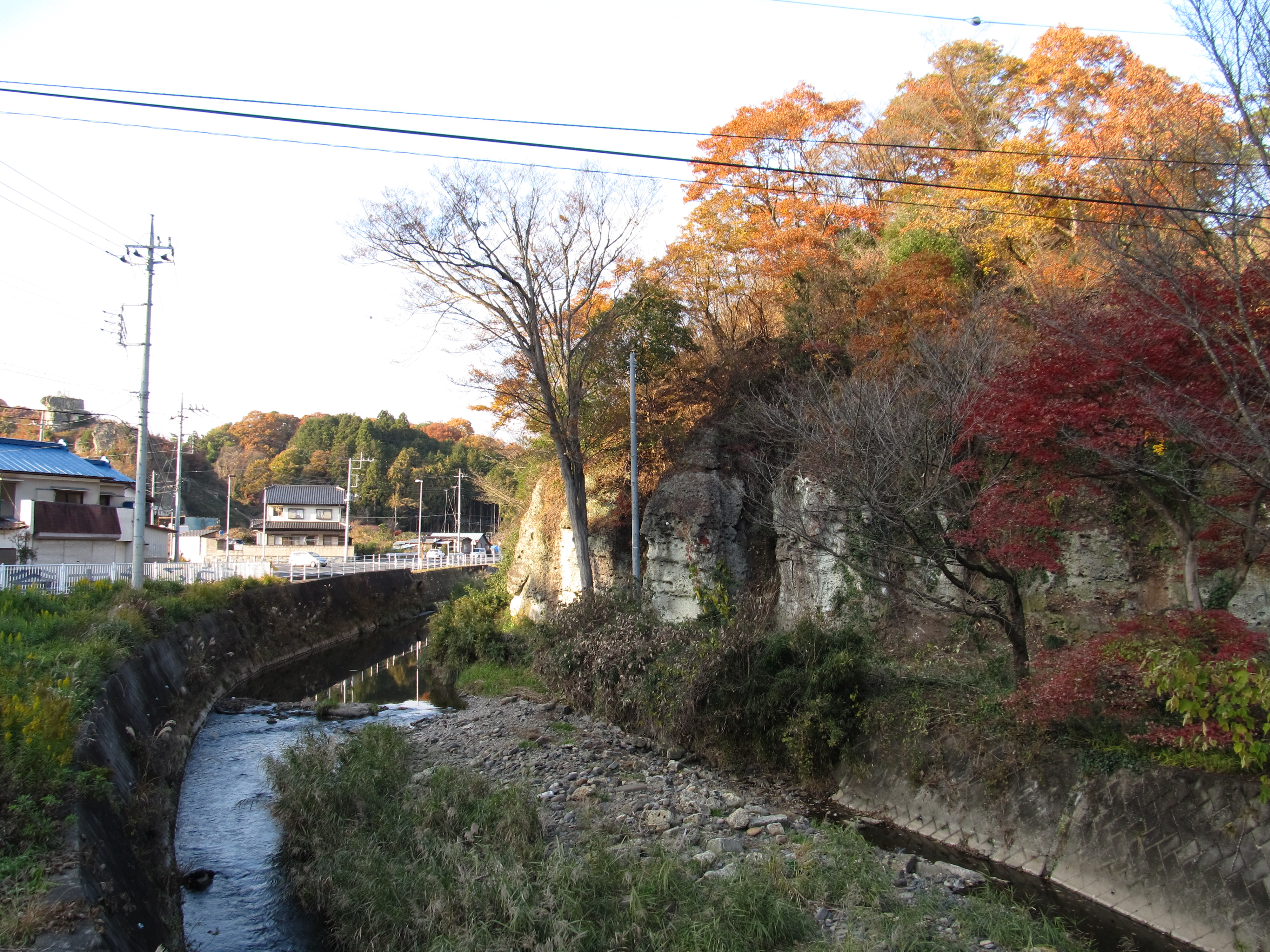 栃木県南部を流れる姿川（宇都宮市大谷で撮影）。